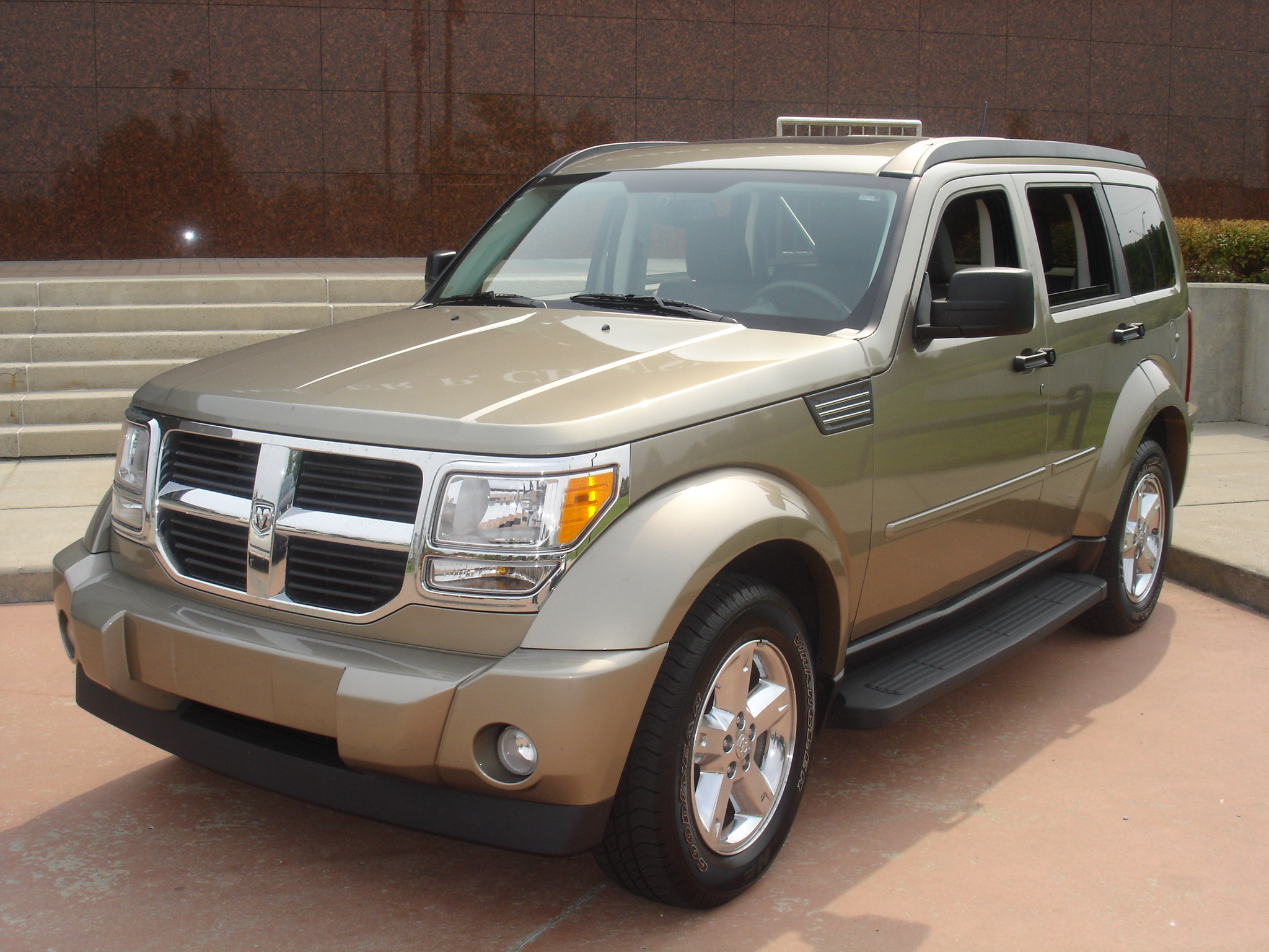 2008 Dodge Nitro